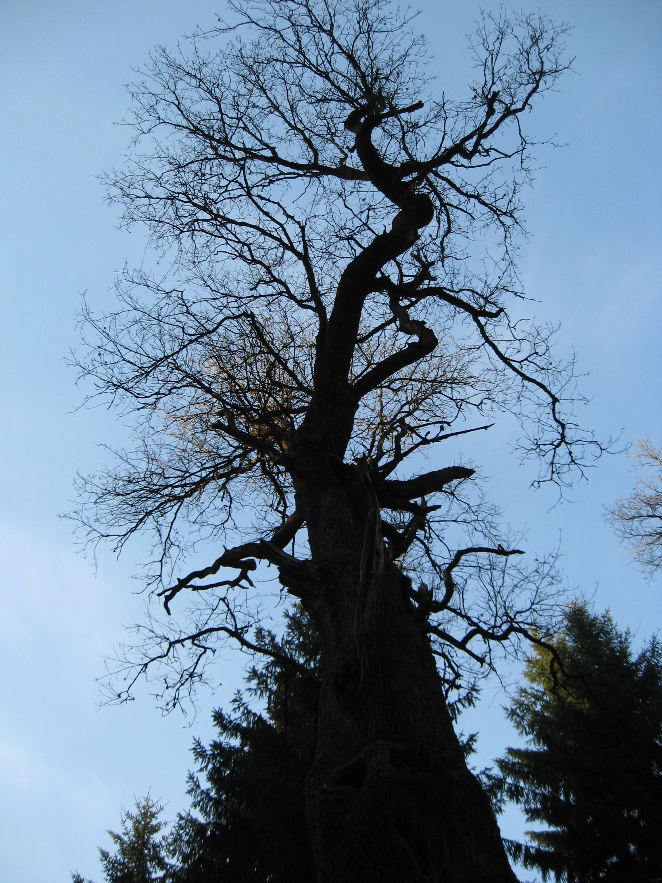 Naturdenkmal „Königseiche“ oder „Schäfer-Eiche“ bei Salchendorf (Neunkirchen), Kreis Siegen-Wittgenstein.